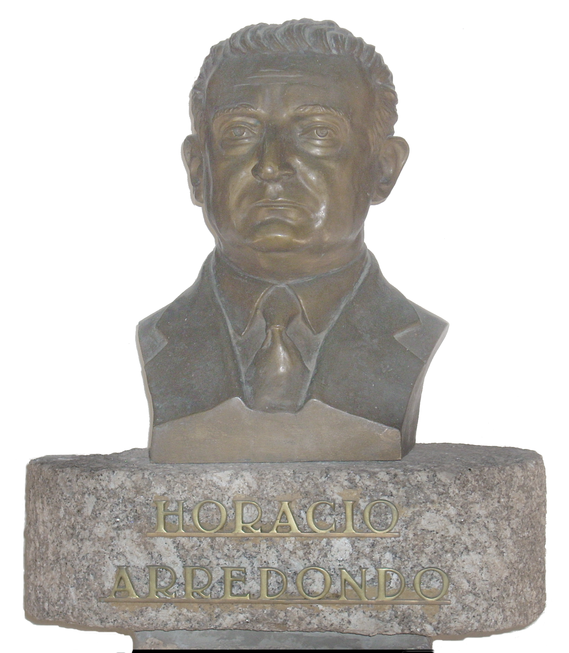 Escultura de Horacio Arredondo en el Parque Nacional de Santa Teresa, Rocha, Uruguay.